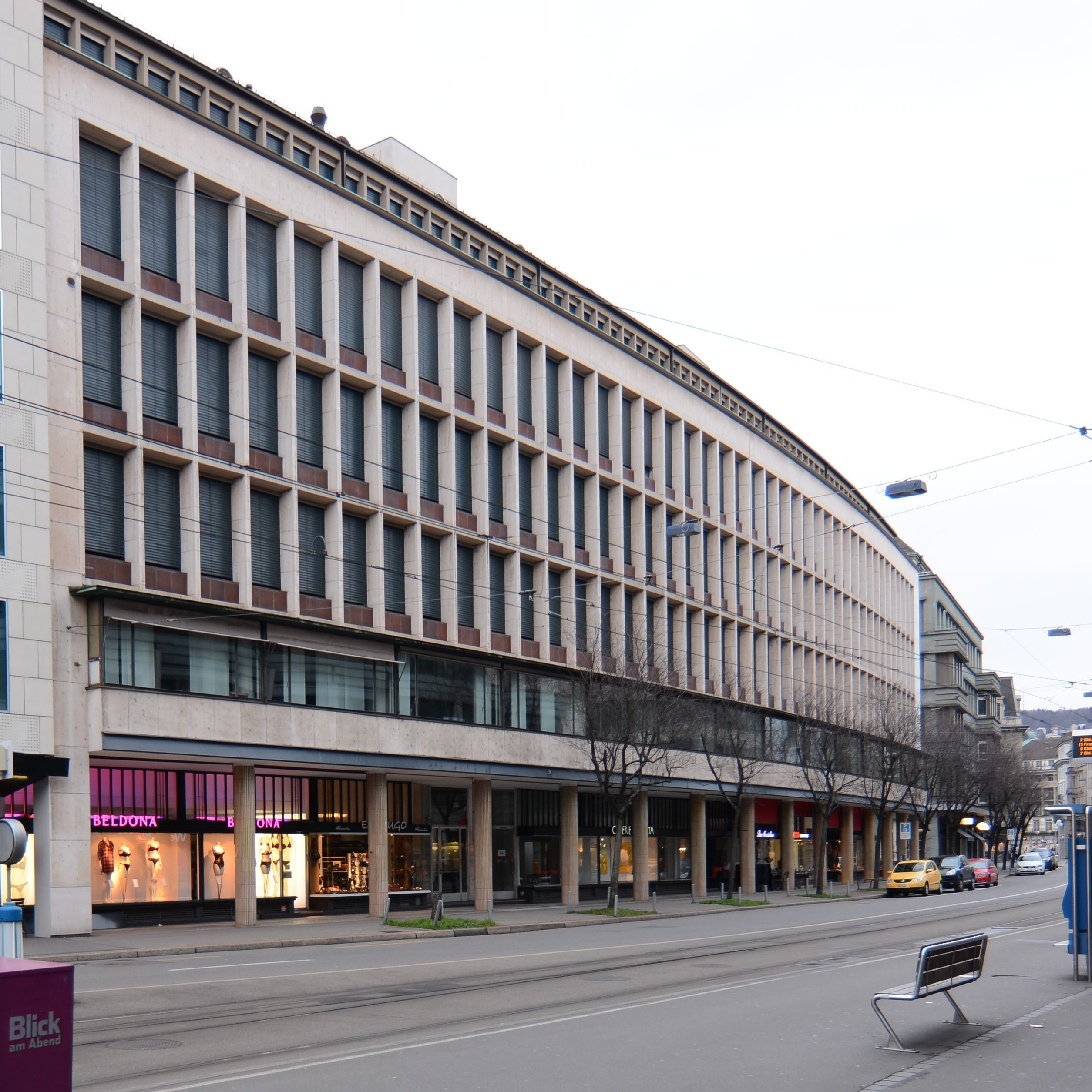 Bleicherhof, Bleicherstr. 18-20, Zürich, Architekt: Otto Rudolf Salvisberg. 1940